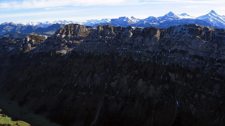 Güggisgrat von Nordwest